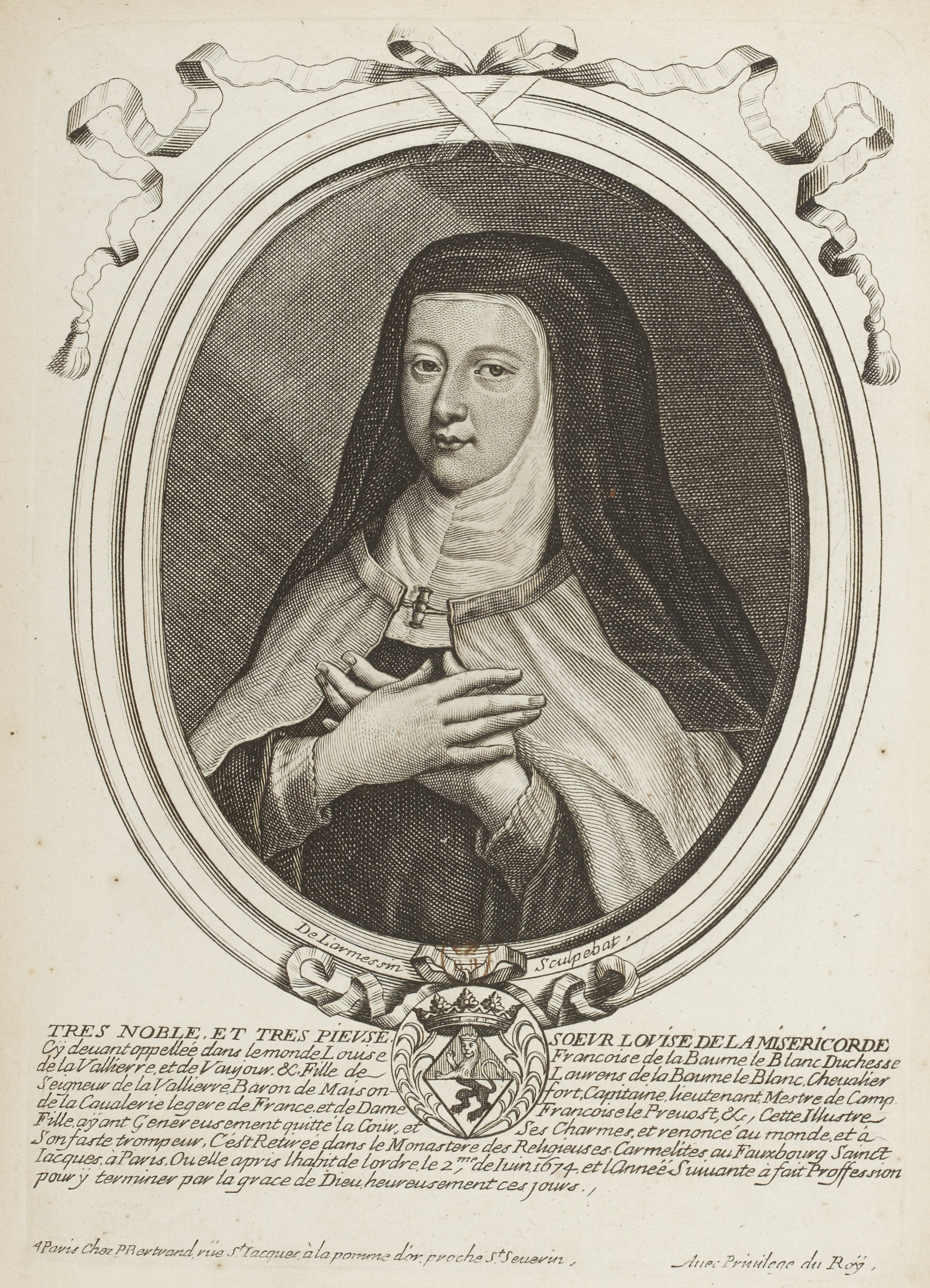 Les augustes représentations de tous les rois de France, depuis Pharamond jusqu'à Louis XIV,... avec un abrégé historique sous chacun, contenant leurs naissances, inclinations et actions plus remarquables pendant leurs règnes